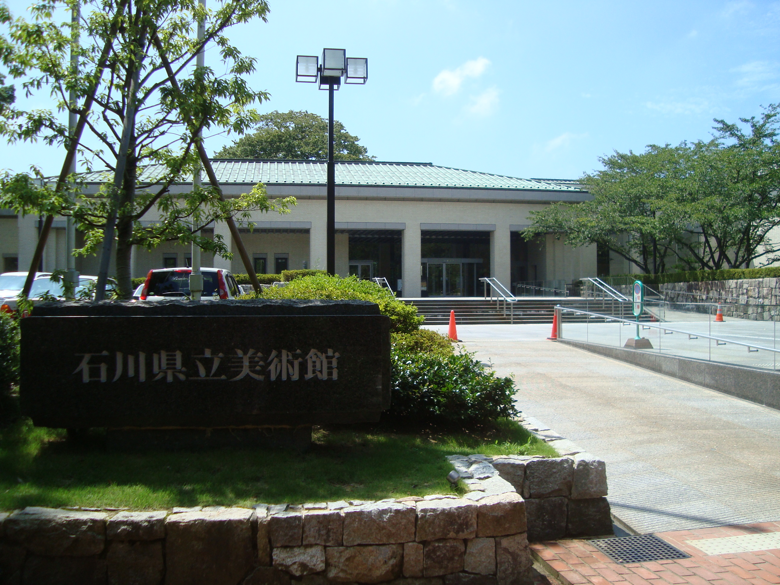 石川県立美術館